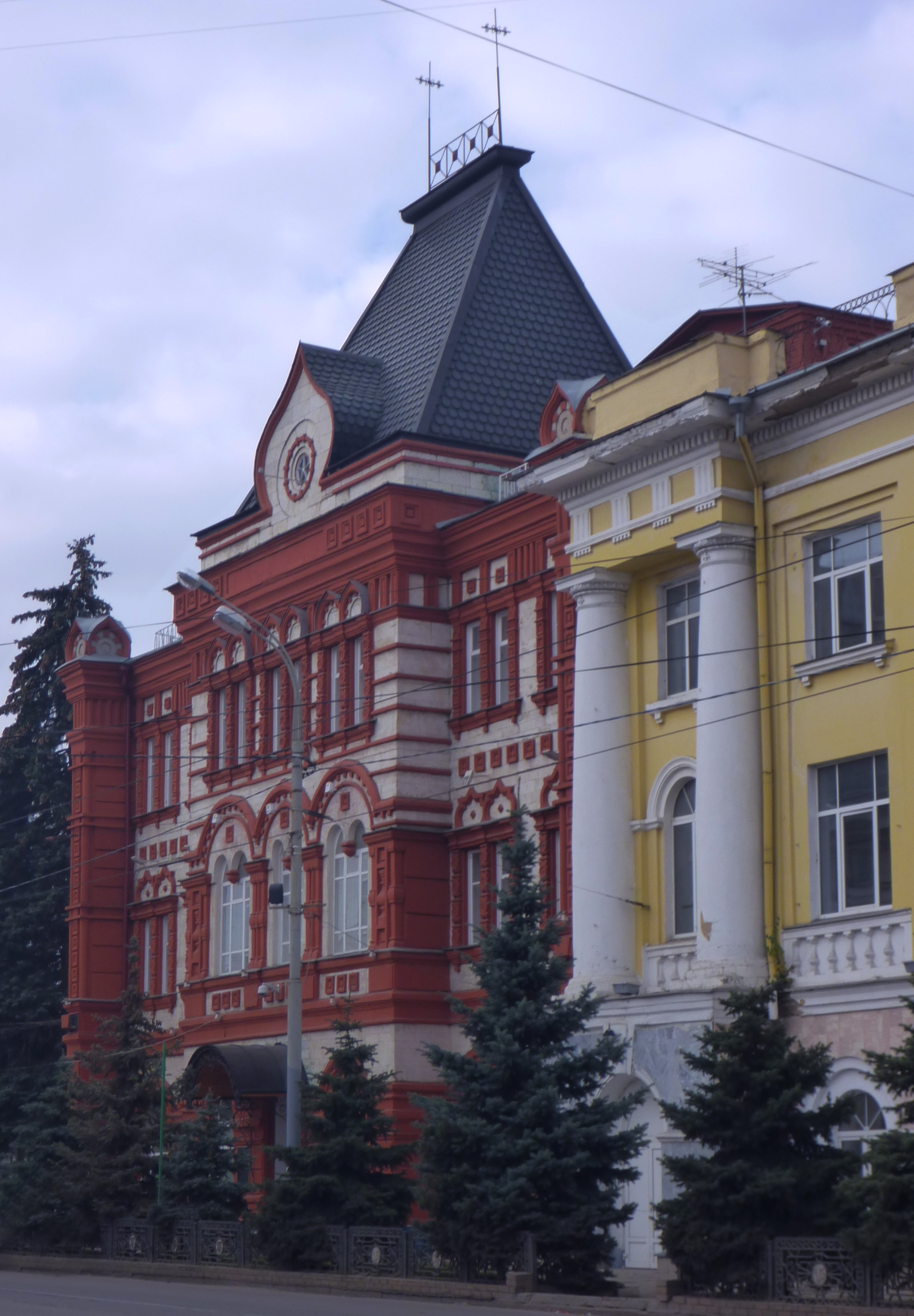 Здание банка: площадь Карла Маркса, 1, Орёл, Орловская область